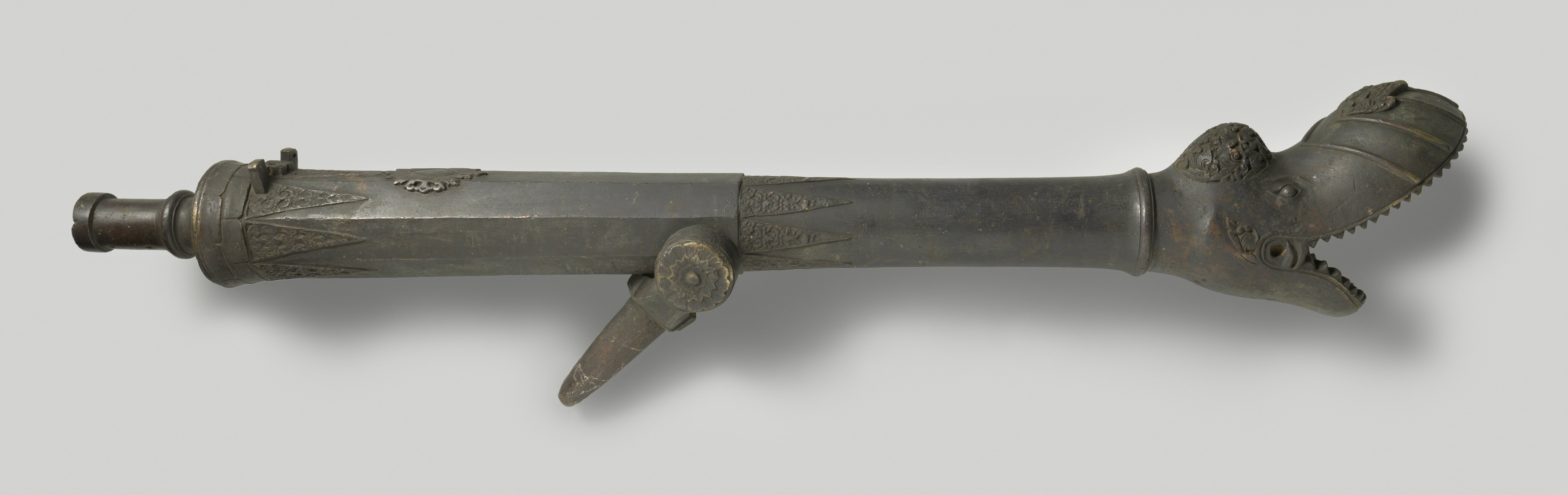 IdentificatieTitel(s): Buitgemaakt geschutLilla of Naga kanonObjecttype: lilla Objectnummer: NG-MC-1103Omschrijving: Bronzen voorlader op mik. De ronde loop heeft een monding in de vorm van een drakenkop met opengesperde muil, de bovenkaak langer dan de onderkaak; op de drakenkop een ornament. De overgangen van drakenkop naar ronde loop en van rond gedeelte naar achtkantig achterstuk bestaan uit gedecoreerde driehoeken. Het bovenste vlak van het achtkantige deel is eveneens versierd; aan de achterzijde hiervan ligt het zundgat, geflankeerd door knoppen voor een zundgatdeksel. Holle staart voor een houten richtstok. De ogen van de mik zijn geheel om de tappen heen gesmeed, zodat het stuk niet uit de mik getild kan worden.VervaardigingVervaardiger: geschutgieter: anoniemPlaats vervaardiging: Indonesische ArchipelDatering: 1667Fysieke kenmerken: bronsMateriaal: brons Afmetingen: geheel: l 172 cm. × d 22 cm. druif-stootbodem: l 18 cm. stootbodem-tromp: l 154 cm. g 150,6 kgToelichtingBuitgemaakt bij Djambische expeditie, augustus 1858. Het werd voor de Nederlandse inzending voor de koloniale tentoonstelling in Parijs van 1931 gebruikt.OnderwerpWaar: DjambiVerwerving en rechtenVerwerving: overdracht van beheer 1883Copyright: Publiek domein